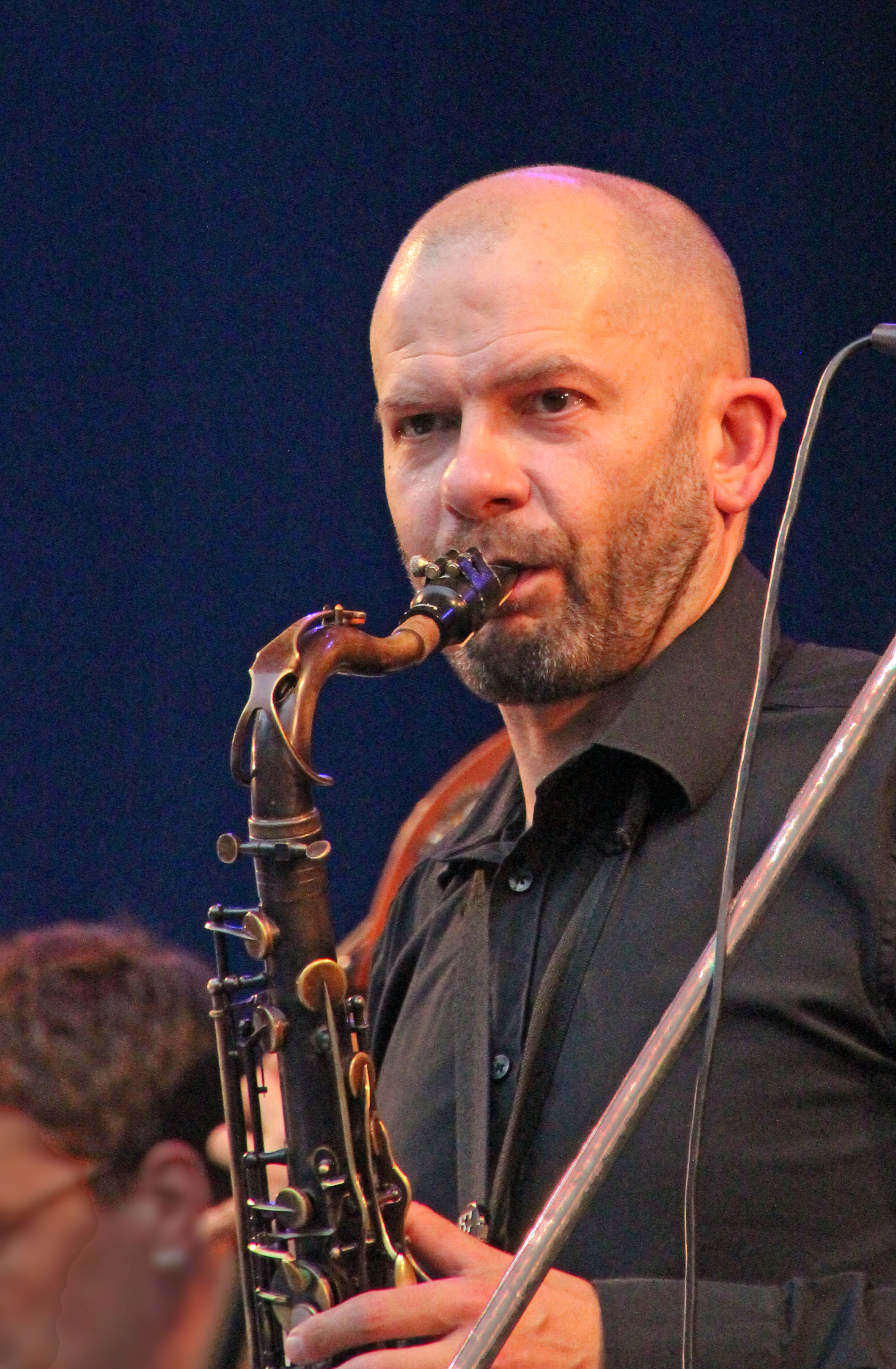 Bildinhalt: Der Saxophonist Domenic Landolf bei einem Auftritt des Christoph-Stiefel-Septetts im Palmengarten Aufnahmeort: Frankfurt am Main, Deutschland Die dargestellte Person wurde bei einem öffentlichen Auftritt fotografiert.